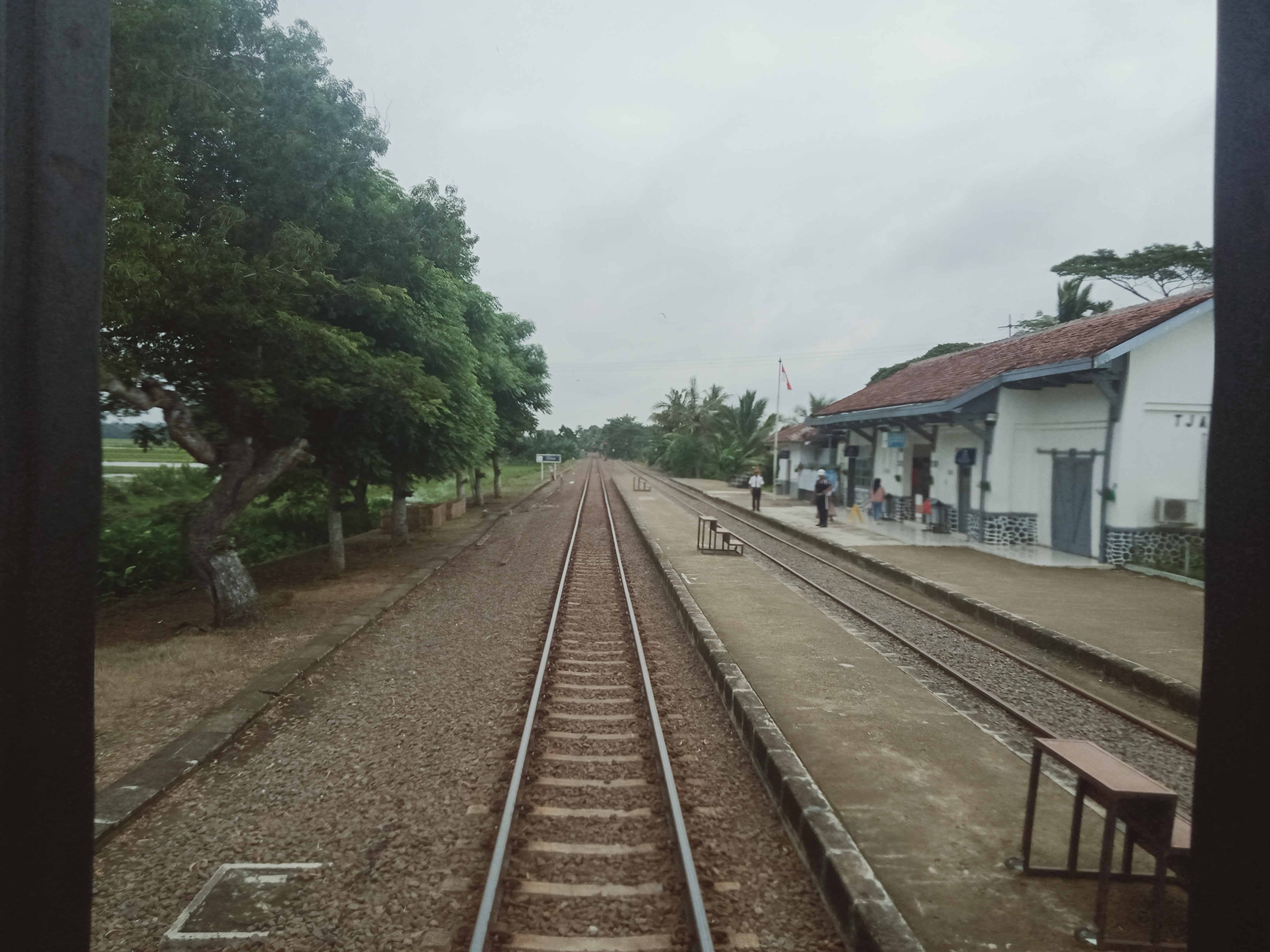 Bangunan Stasiun Catang, 2020